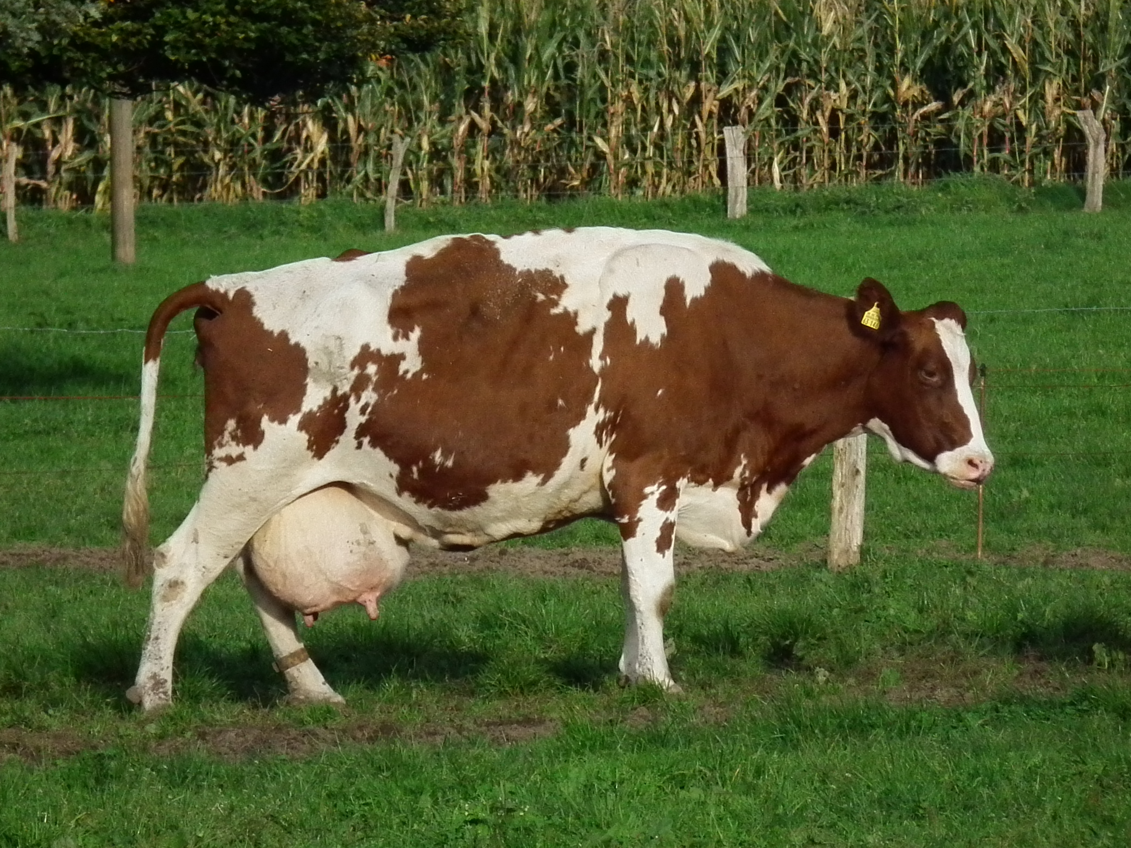 Milchkuh mit einem am späten Nachmittag prall gefüllten Euter, fotografiert in Gescher (Nordrhein-Westfalen, Deutschland)